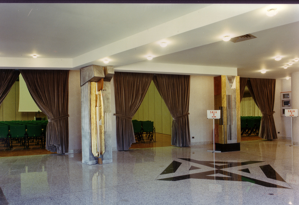 Teatro Ariston - Sala Roof Sanremo